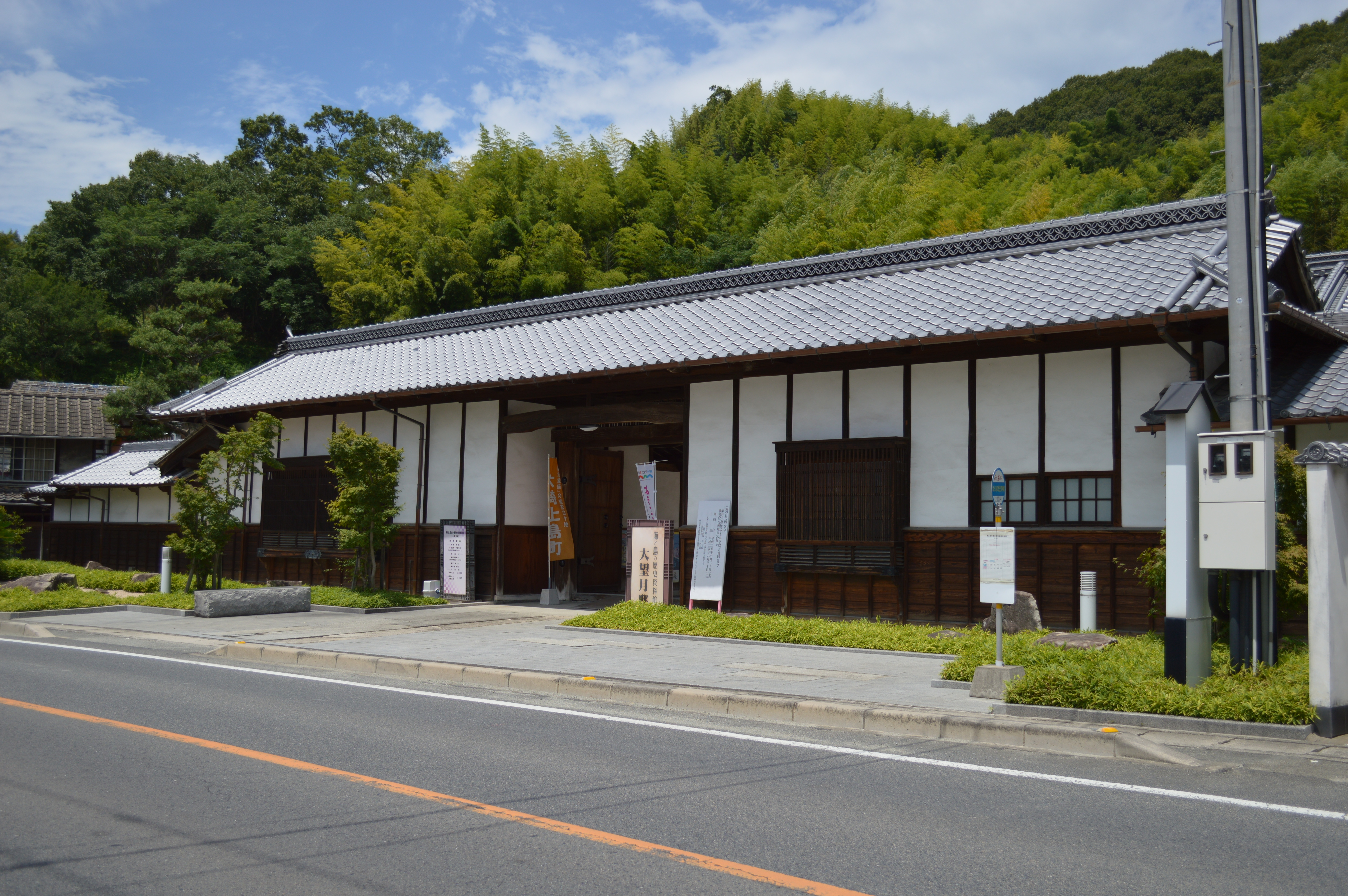 広島県の大崎上島にある「海と島の歴史資料館」